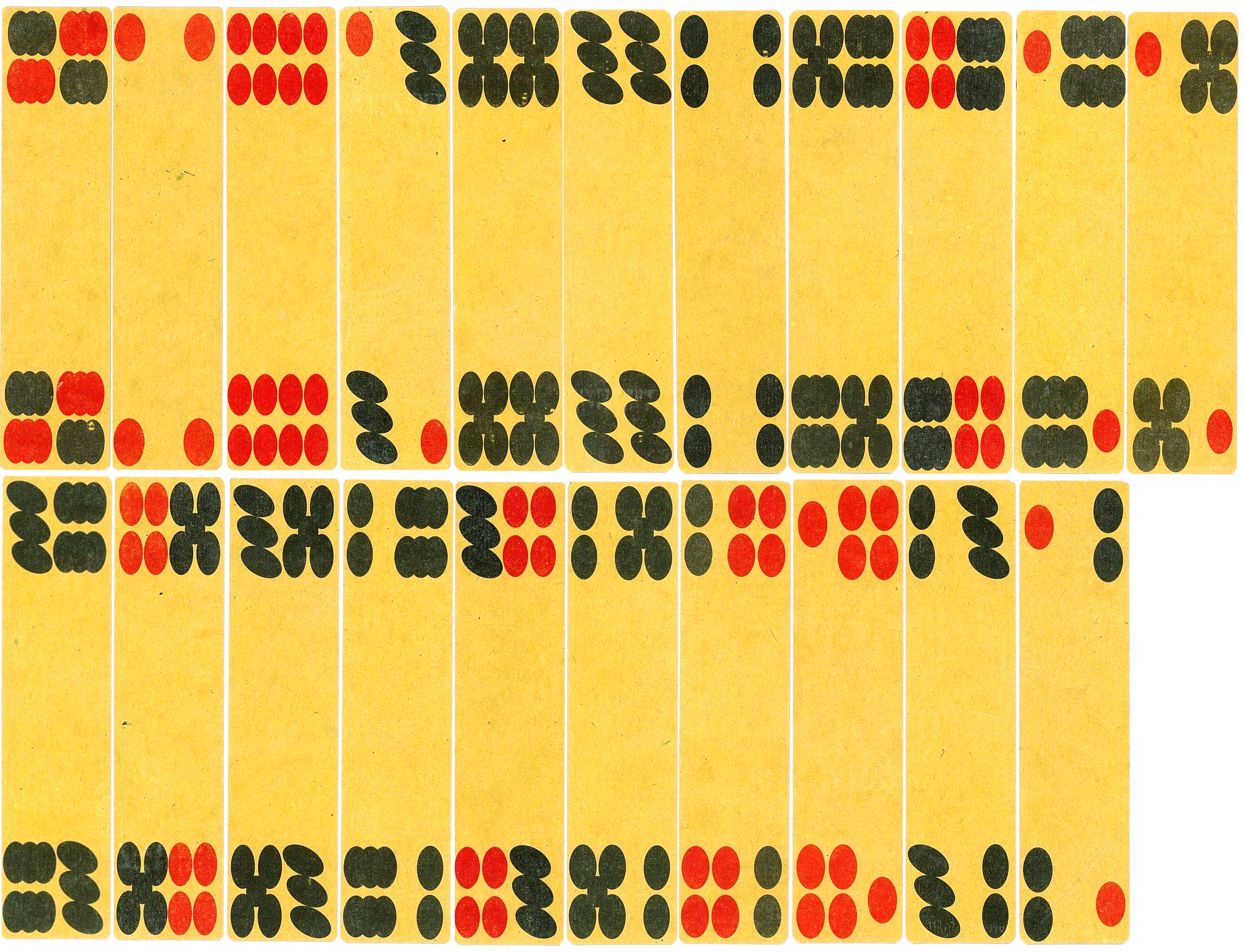 中文（台灣）: 四川長牌牌具